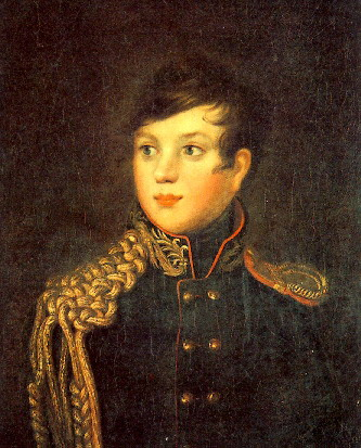 Строганов Александр Павлович (1794-1817)